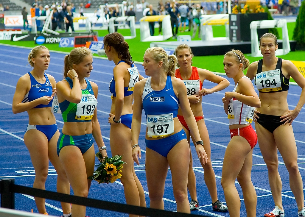 100m B-Lauf ISTAF 2006: Susann Dombrowski, Sina Schielke, Jala Gangnus, Sandra Möller, Mareike Peters, Agnieszka Ceglarek, Stepanka Klapacova